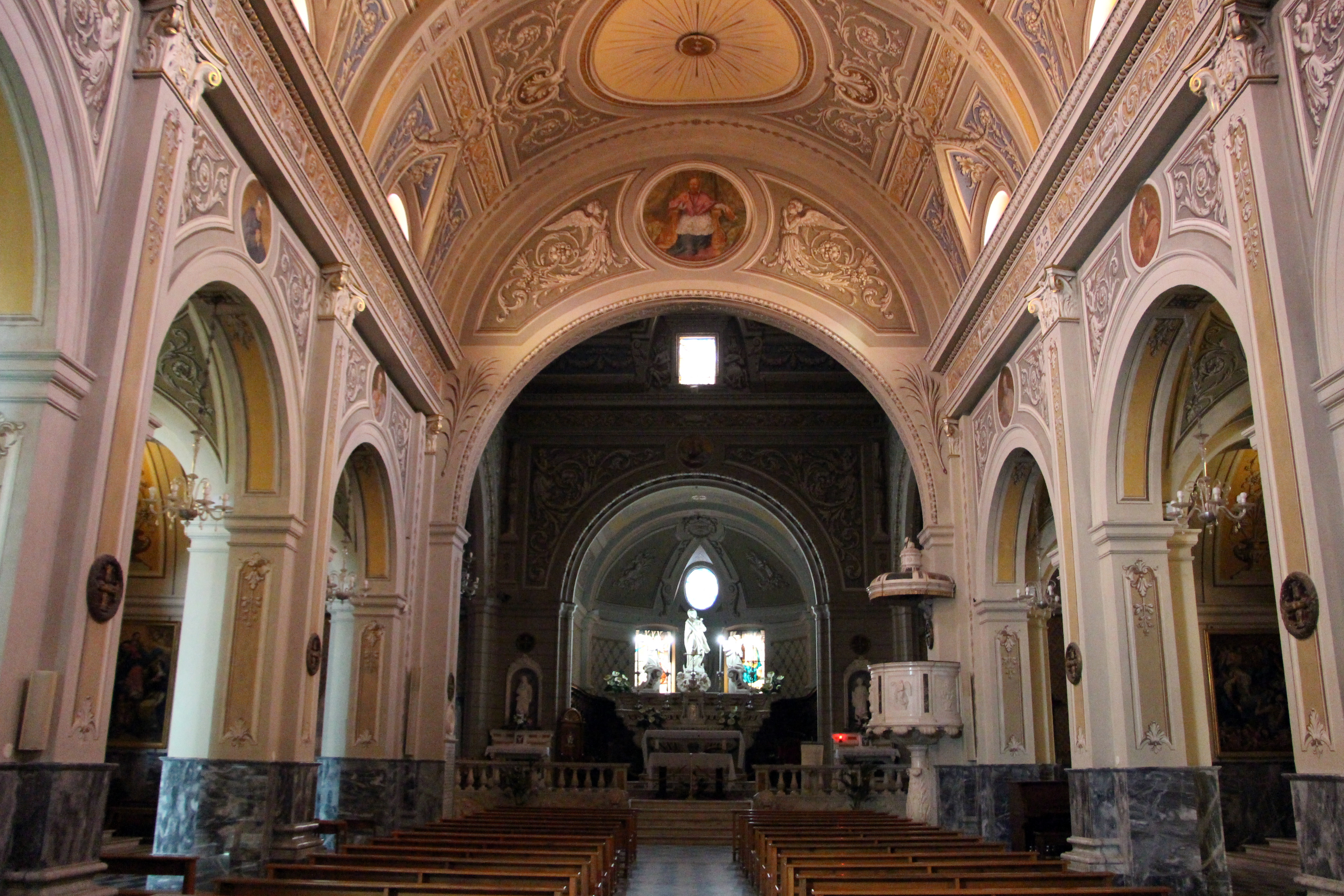 Ozieri